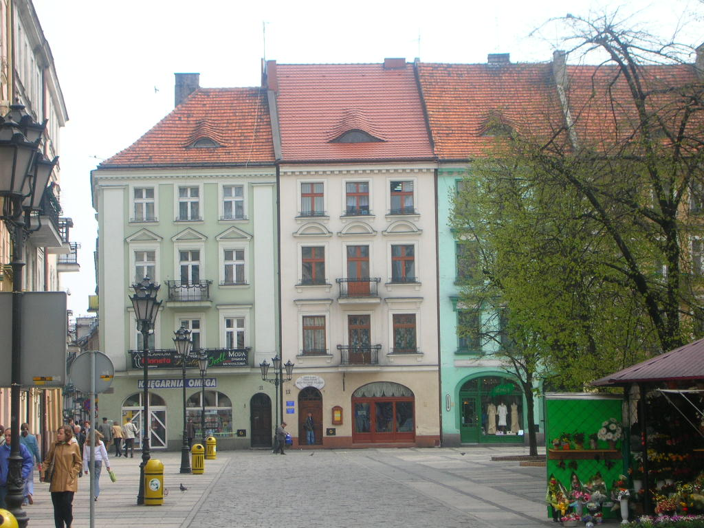 Głowny Rynek w Kaliszu. Autor: Bartek Wawraszko (Bast)